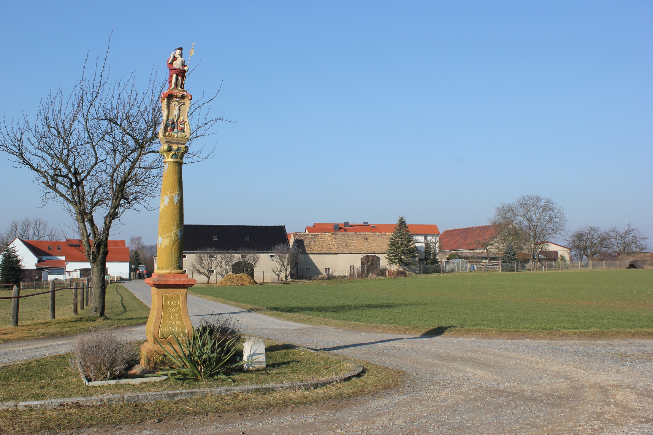 Hornjoserbsce: Modlerski stołp pola Wěteńcy.